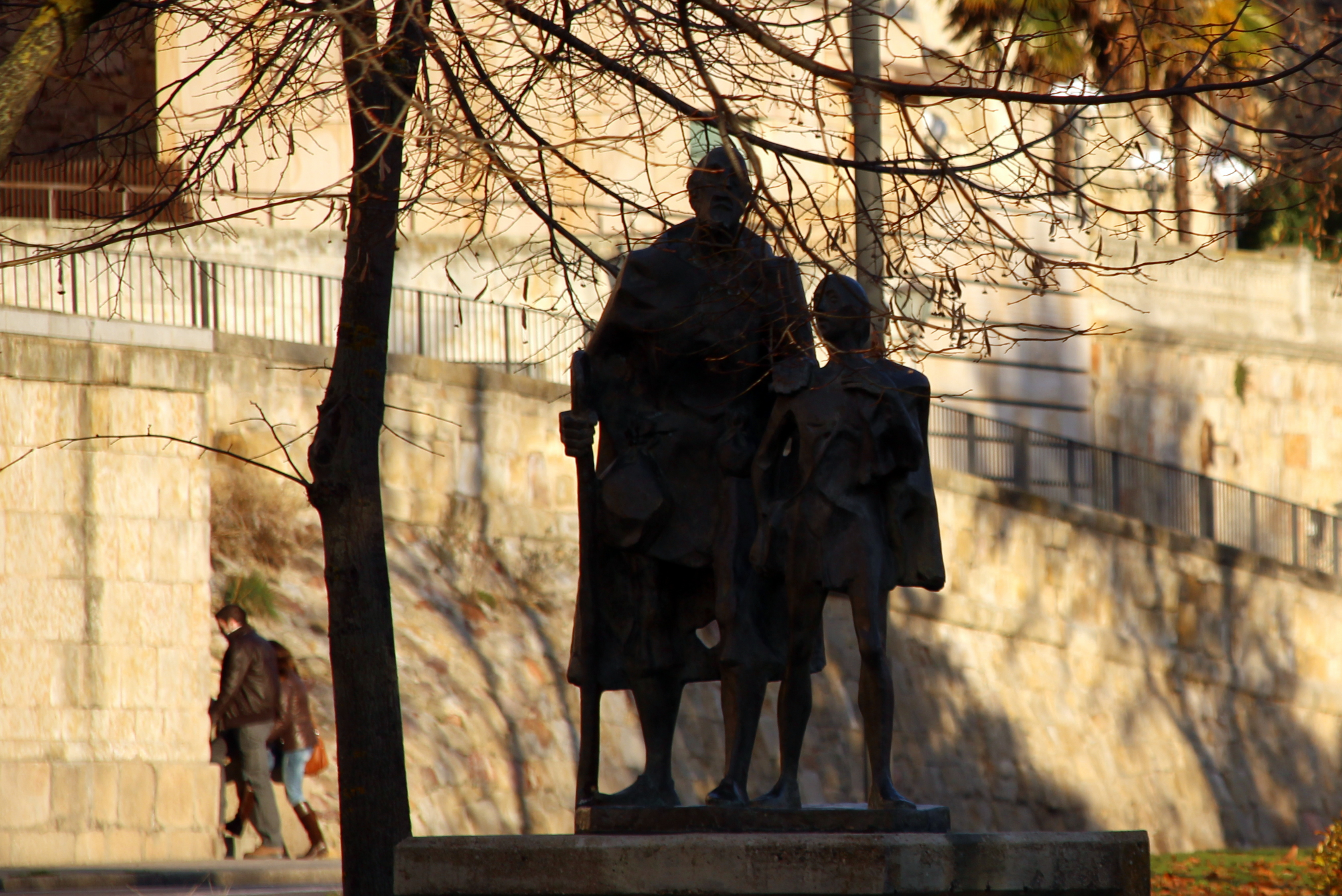 Monumento al Lazarillo junto al puente romano de Salamanca.